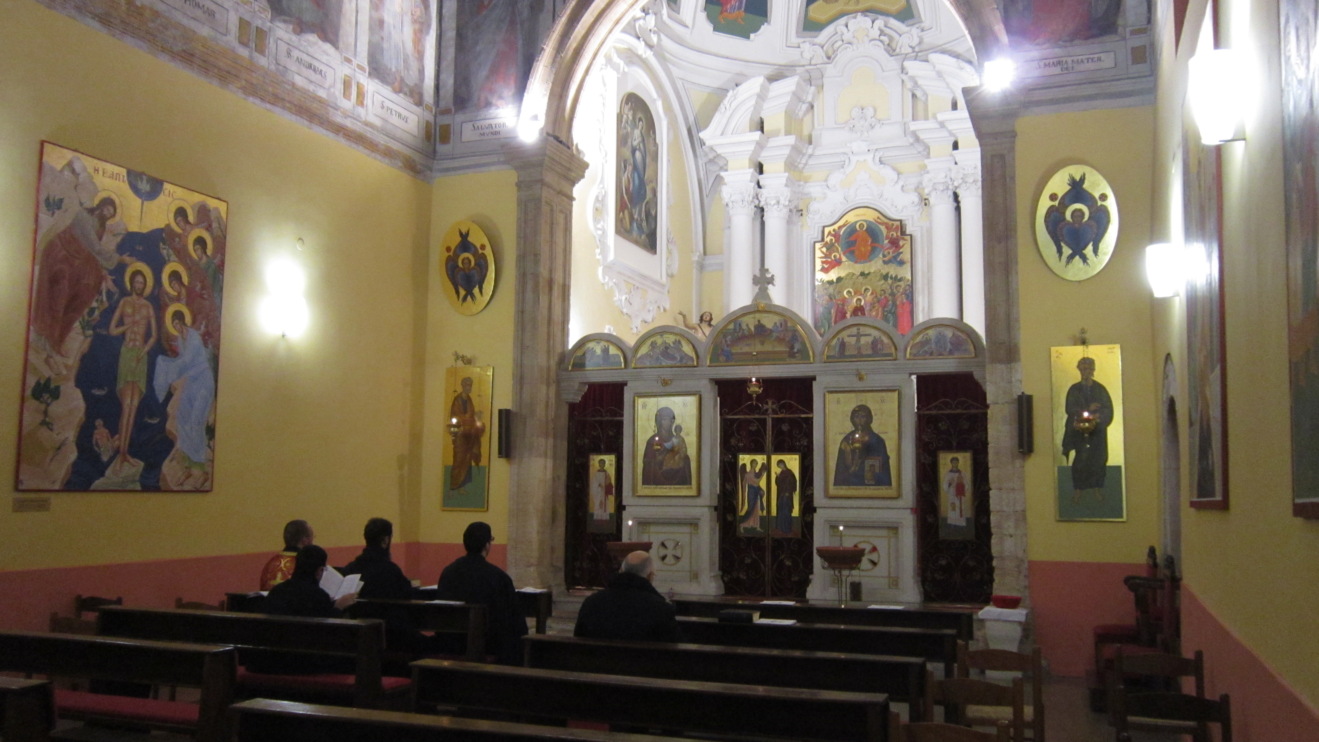 Chiesa del Santissimo Salvatore in Cosenza, Parrocchia Italo-Albanese di rito bizantino per i fedeli albanesi residenti in città. Eparchia di Lungro.